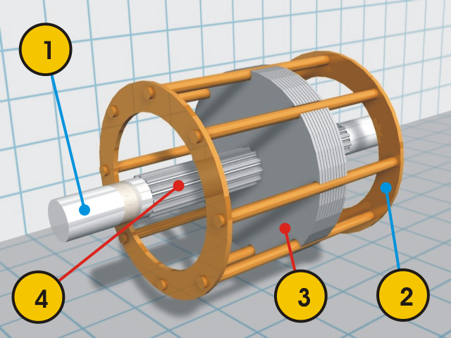 Induction motor squirel cage illustration